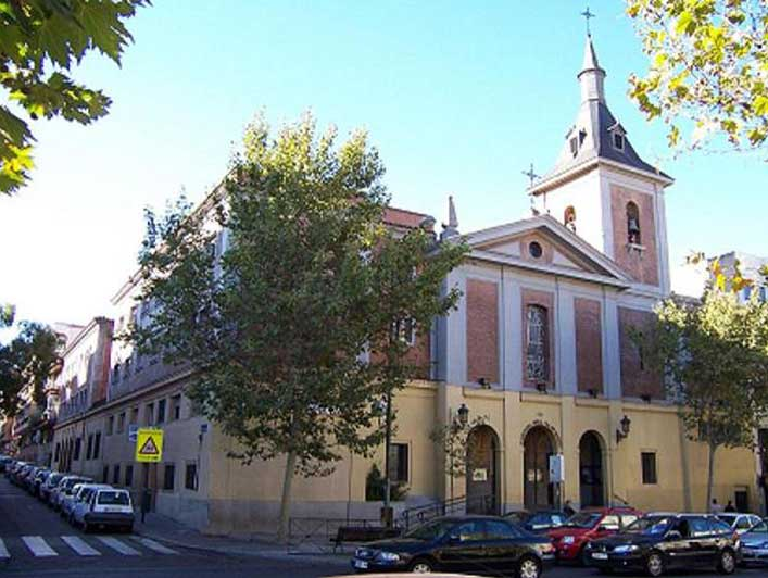 Fachada parroquia Fátima barrio Quintana, Madrid